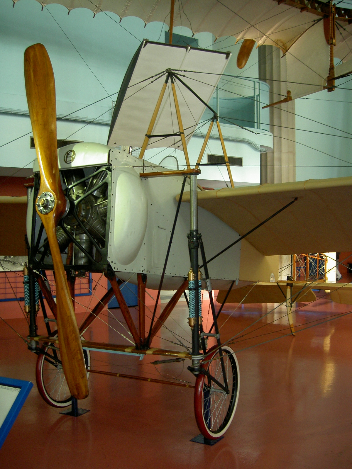 Blériot_XI-2 (Plane of “Adolphe Pégoud”)